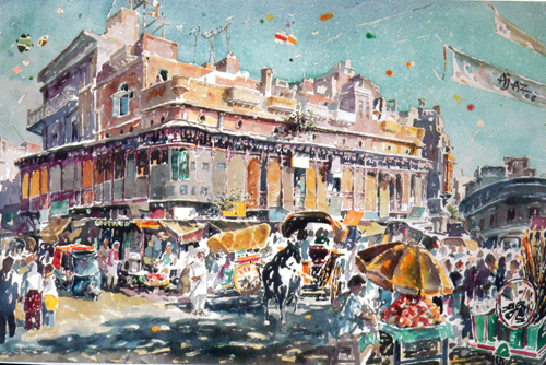 Painting by Ajaz Anwar